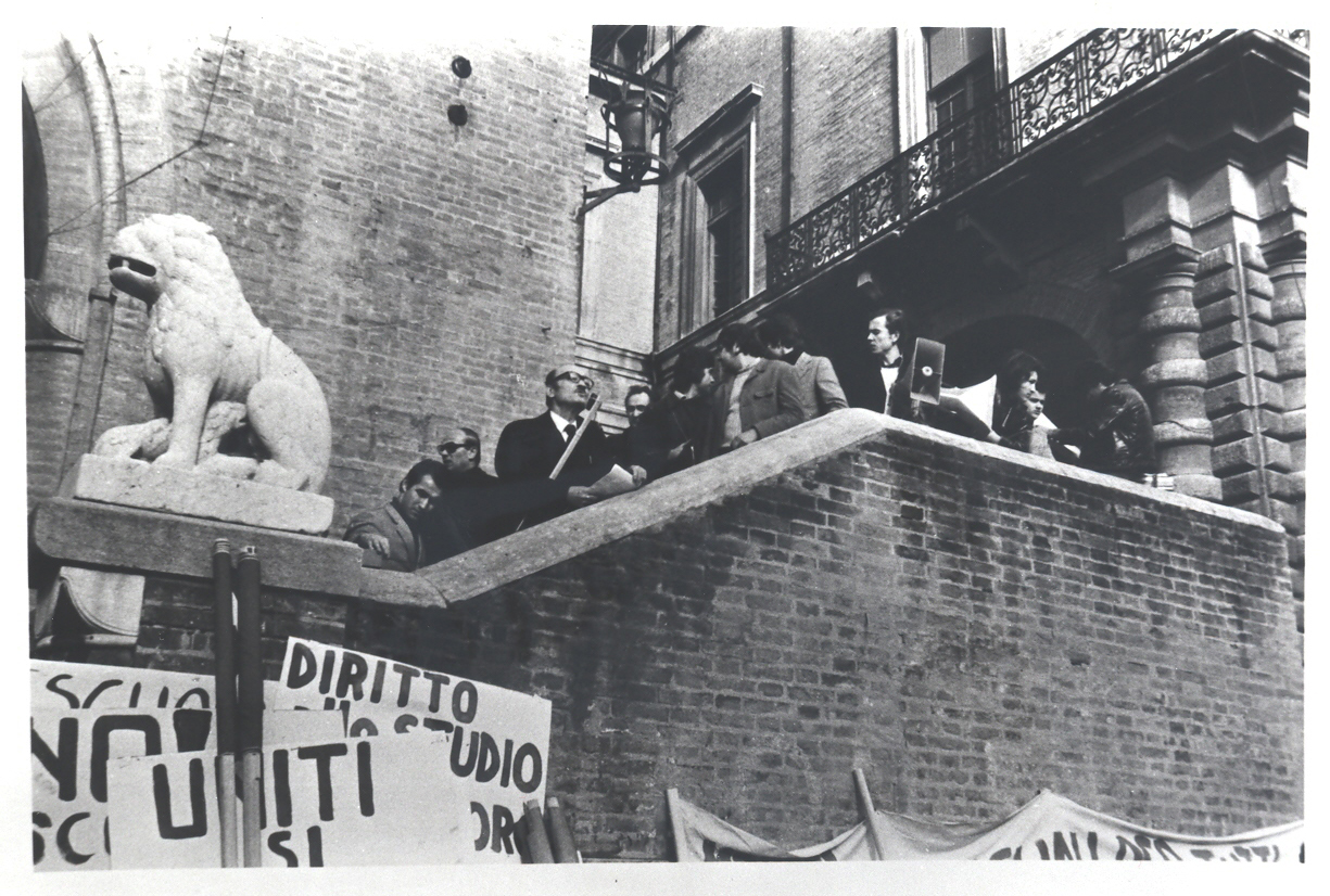 Vito Nicoletti durante un comizio CGIL in Piazza Cavour, Rimini